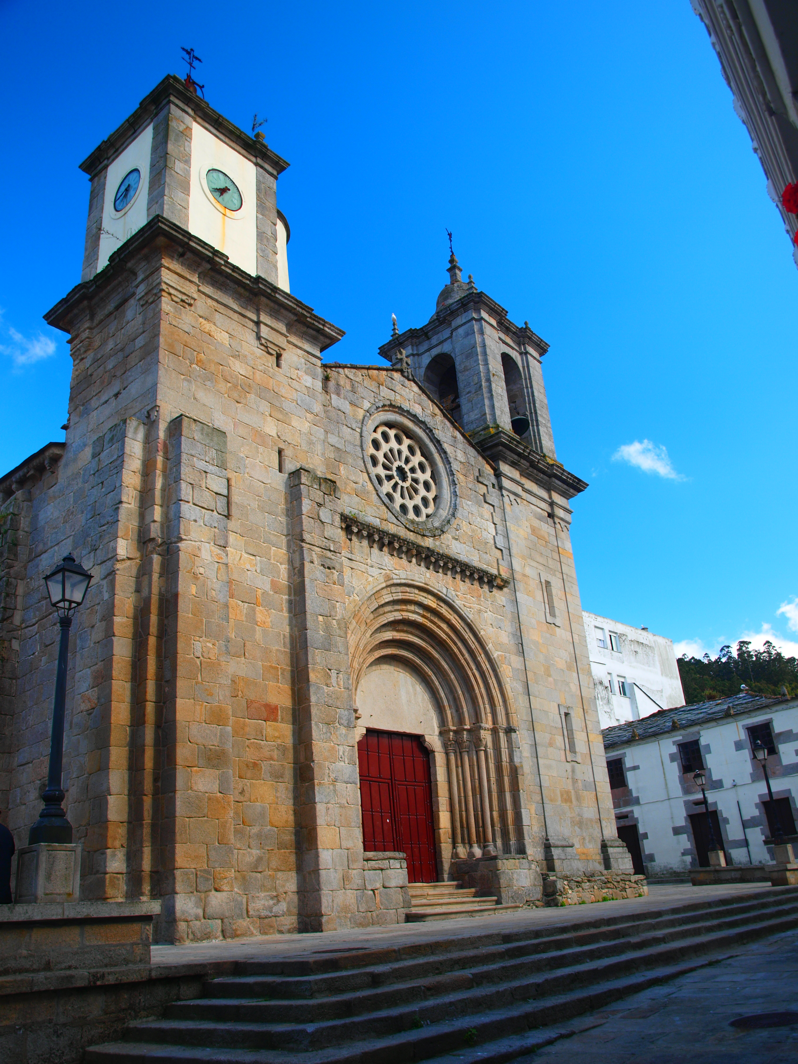 VIVEIRO